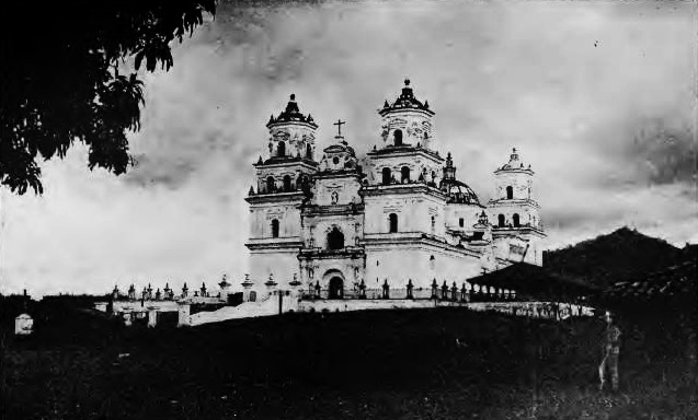 Grabado del libro Guatemala, the land of quetzal de William T. Brigham, publicado en 1887. Iglesia de Esquipulas en 1884.